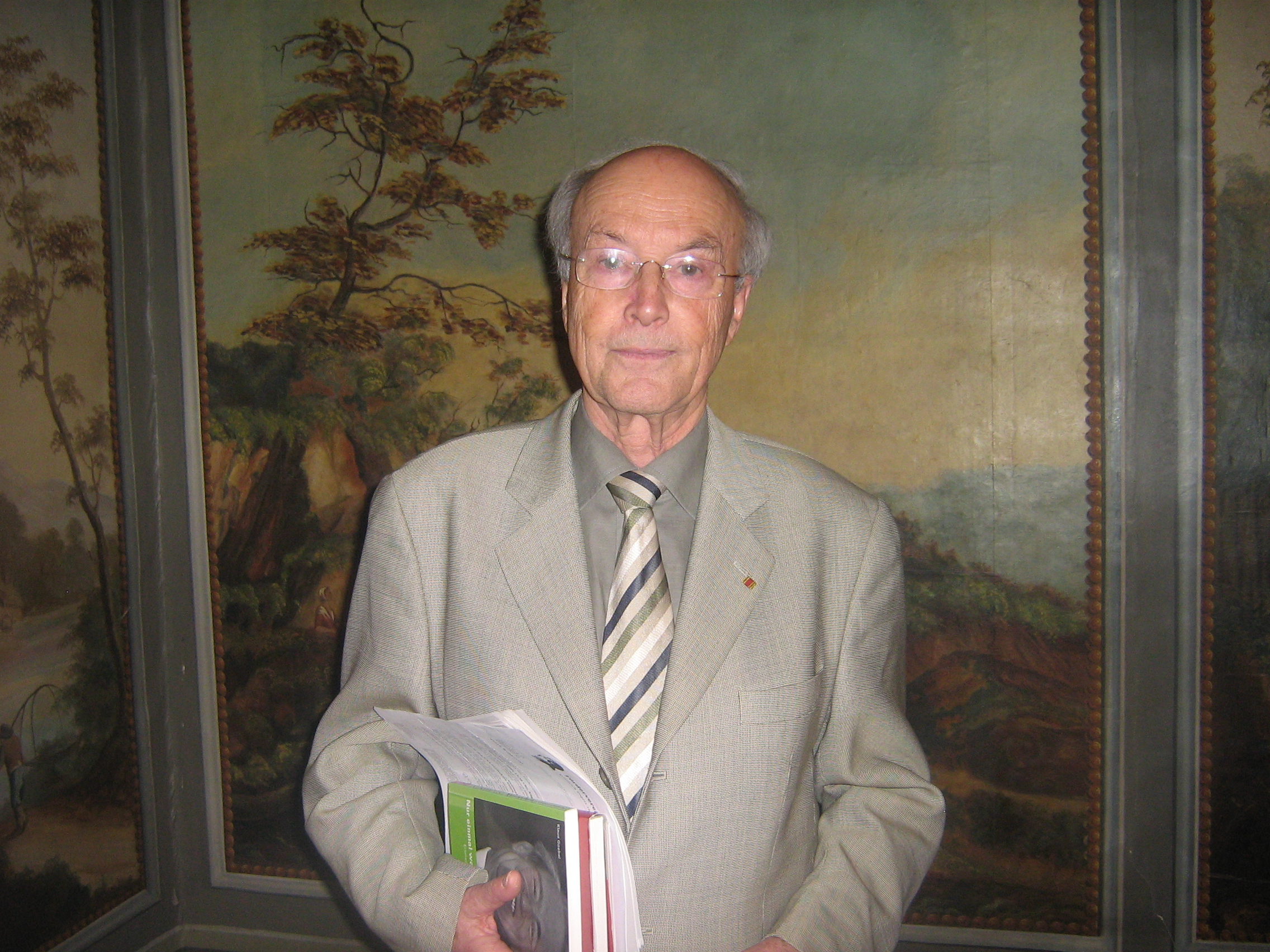 Professor Klaus Goebel (* 1934), deutscher Historiker aus Wuppertal, nach einer Lesung seines Buches über Hermann Enters im Engelshaus, dem Geburtshaus von Friedrich Engels.